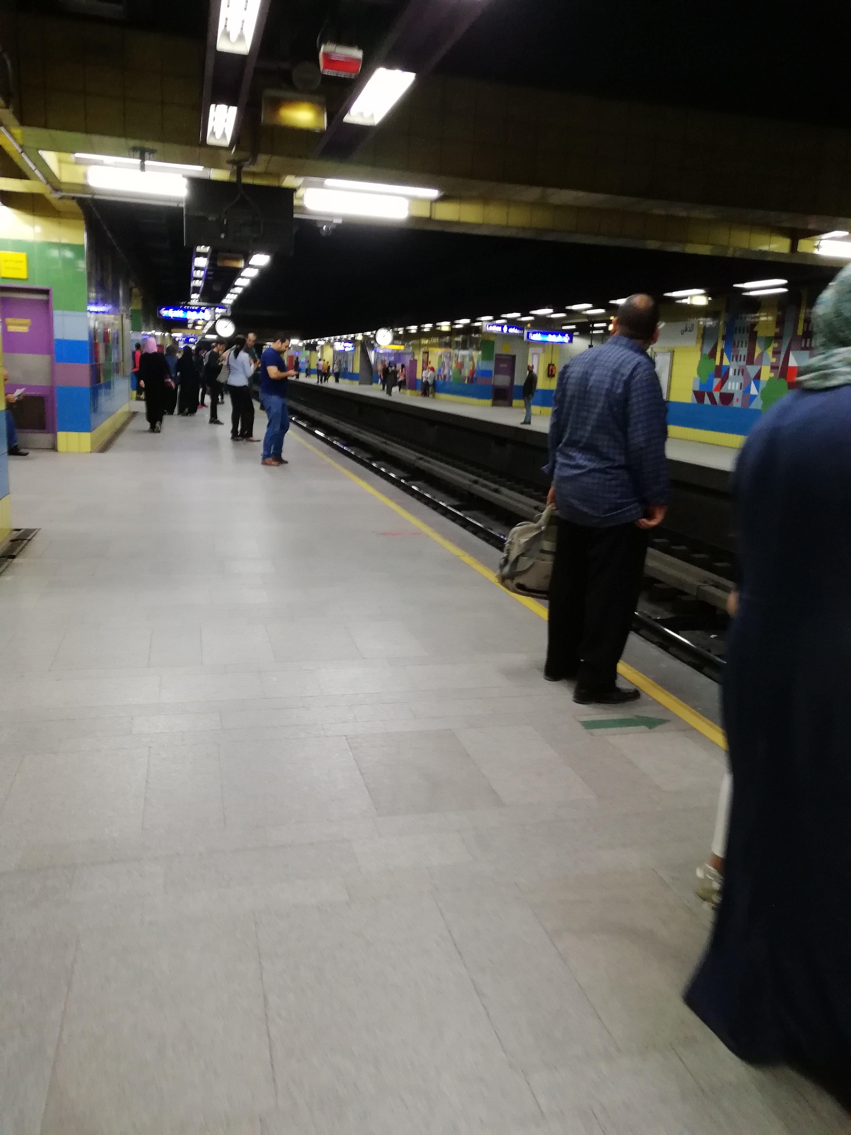 Cairo Metro